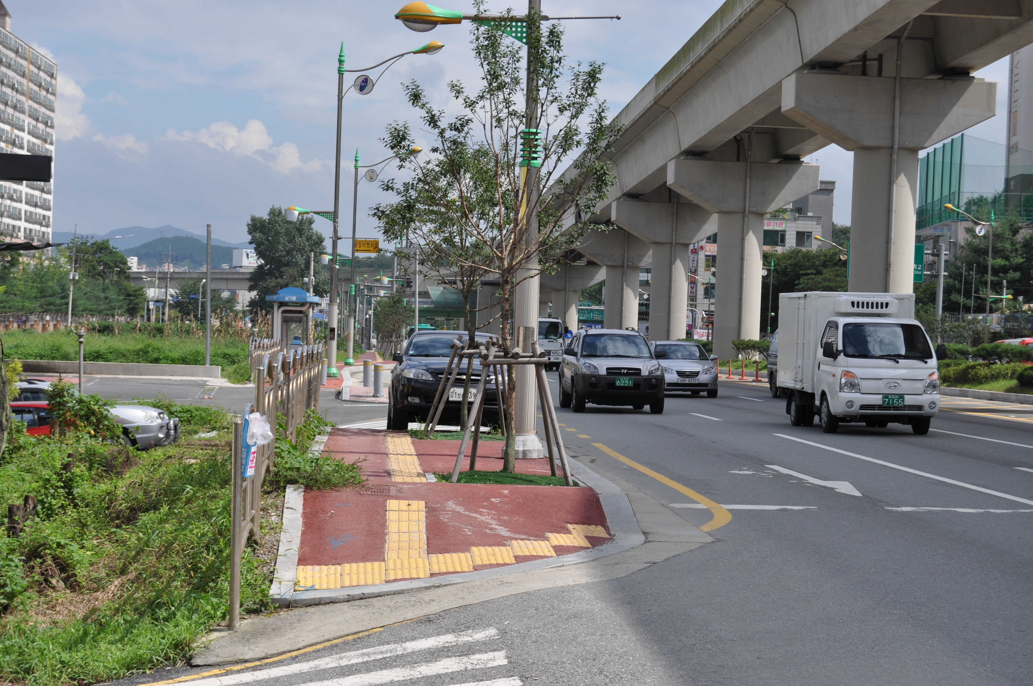 삼가동 어느 거리